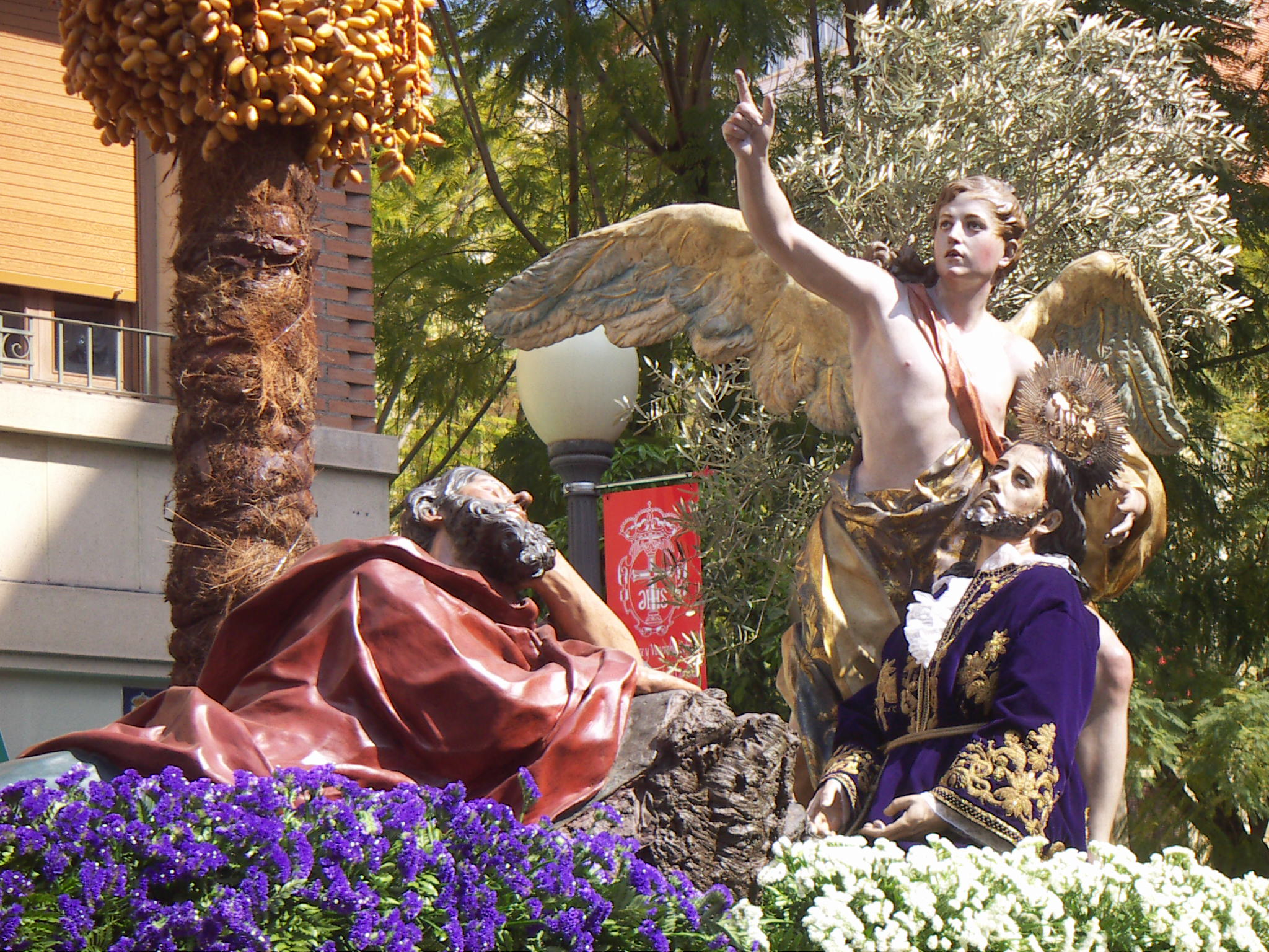 Paso procesional de la Oración del Huerto de Francisco Salzillo (siglo XVIII), que defila en la mañana del Viernes Santo con la Cofradía de Nuestro Padre Jesús en Murcia (España).